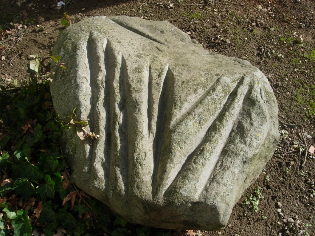 Polissoir Préhistoire Néolithique Aube France Marcilly-le-Hayer Musées de Troyes